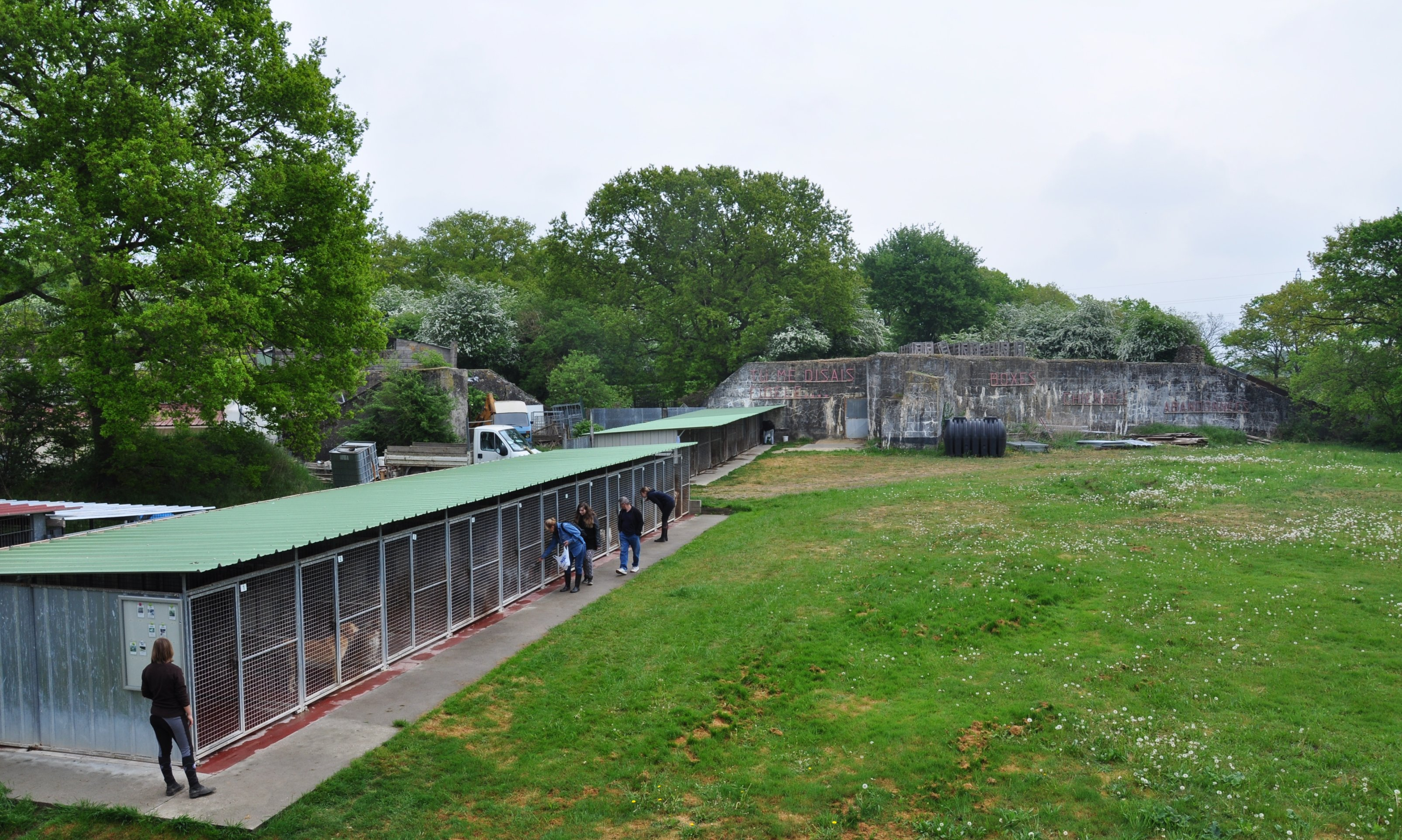 Intérieur de l'ouvrage du Mordant, faisant partie de la défense de la place de Toul en Meurthe-et-Moselle